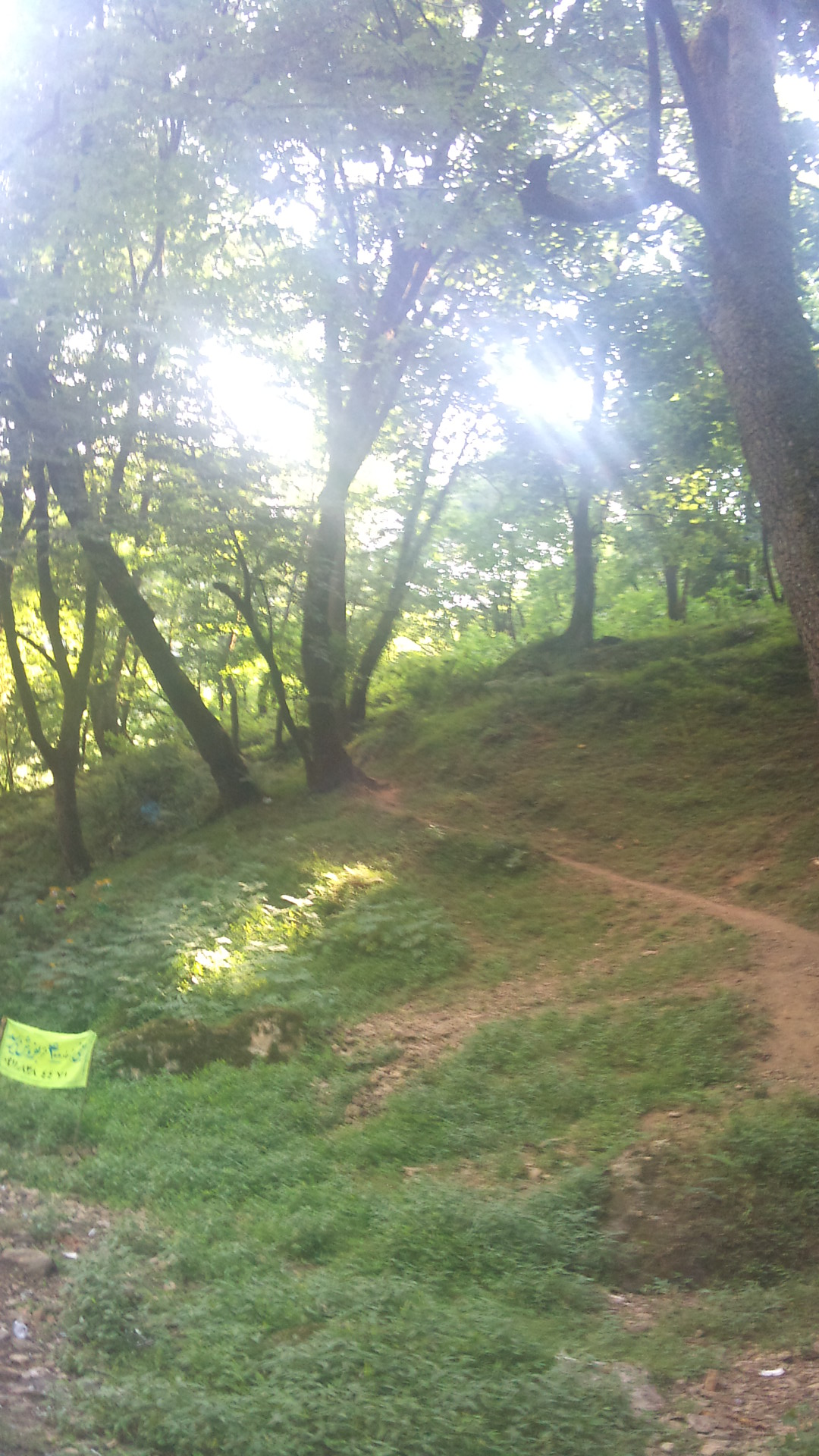 جنگل گیلان